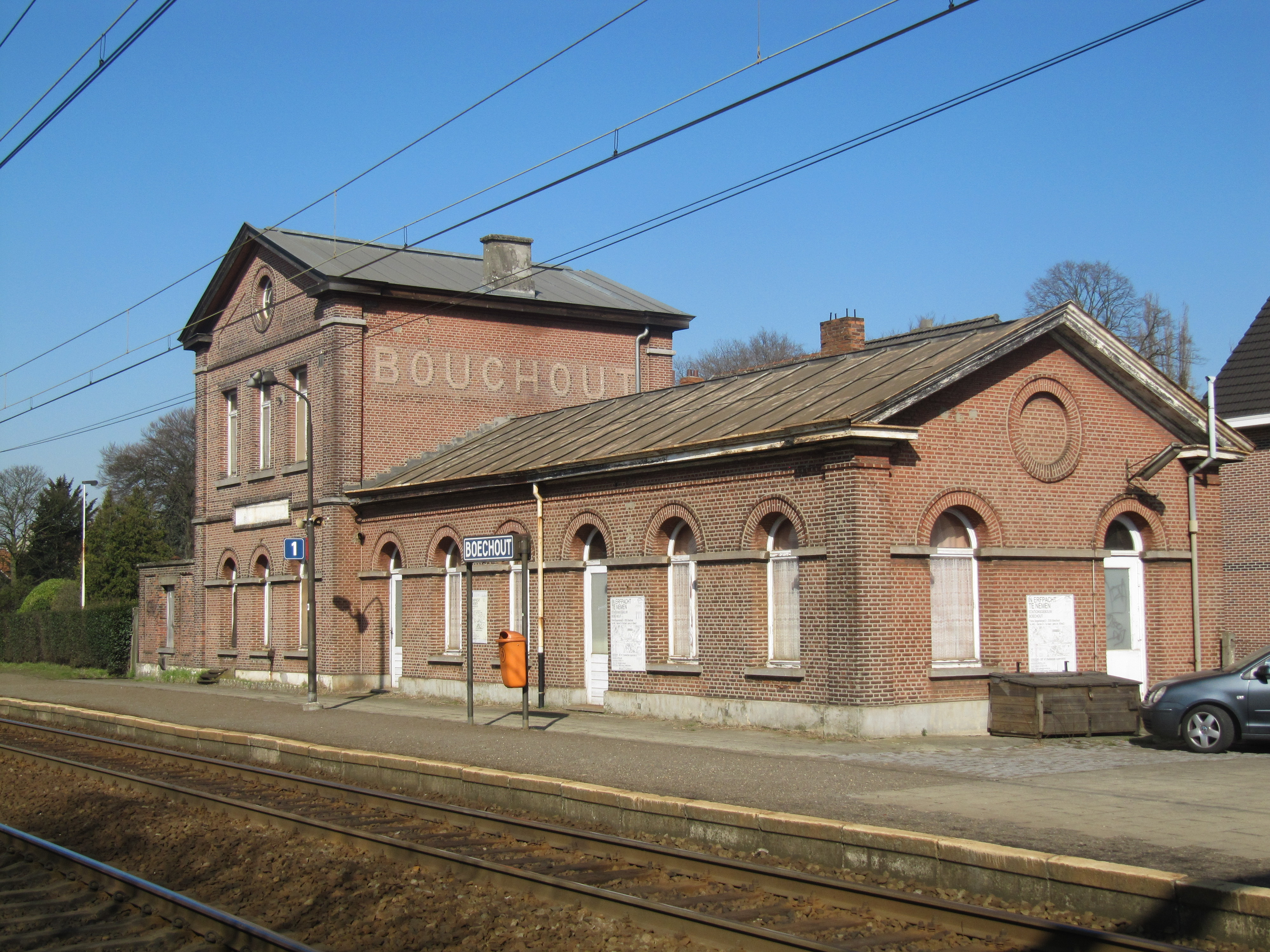 86″ N, 4° 29′ 39.19″ E